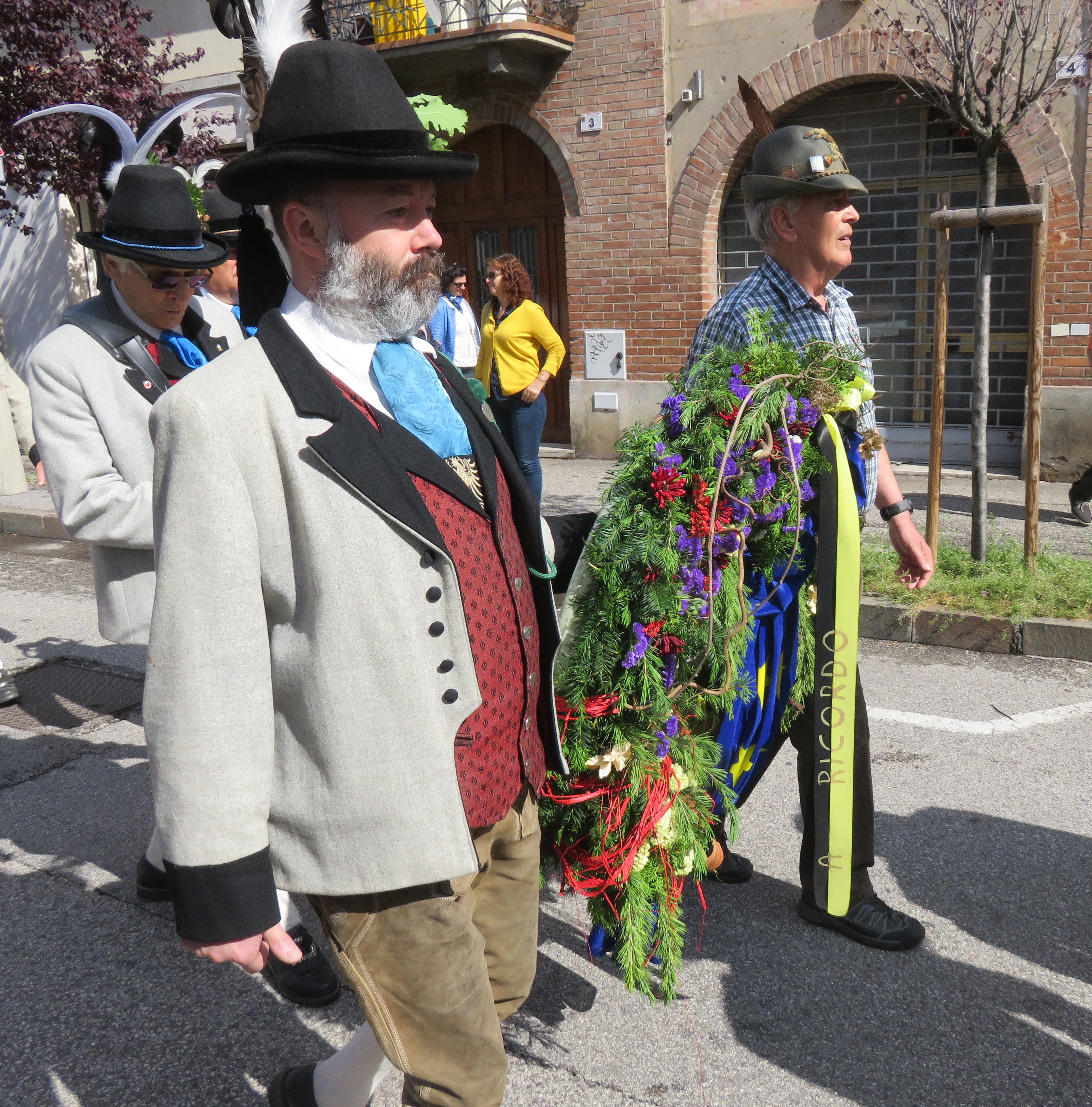 12 maggio 2018 - Alpini e Schützen (eredi delle storiche milizie tirolesi) sfilano assieme a Rovereto, in Trentino, nell'ambito delle manifestazioni per la 91°Adunata Nazionale Alpini a Trento. Vengono deposte due corone d'alloro al monumento all'Alpino in via Dante e agli Schützen in via Tartarotti